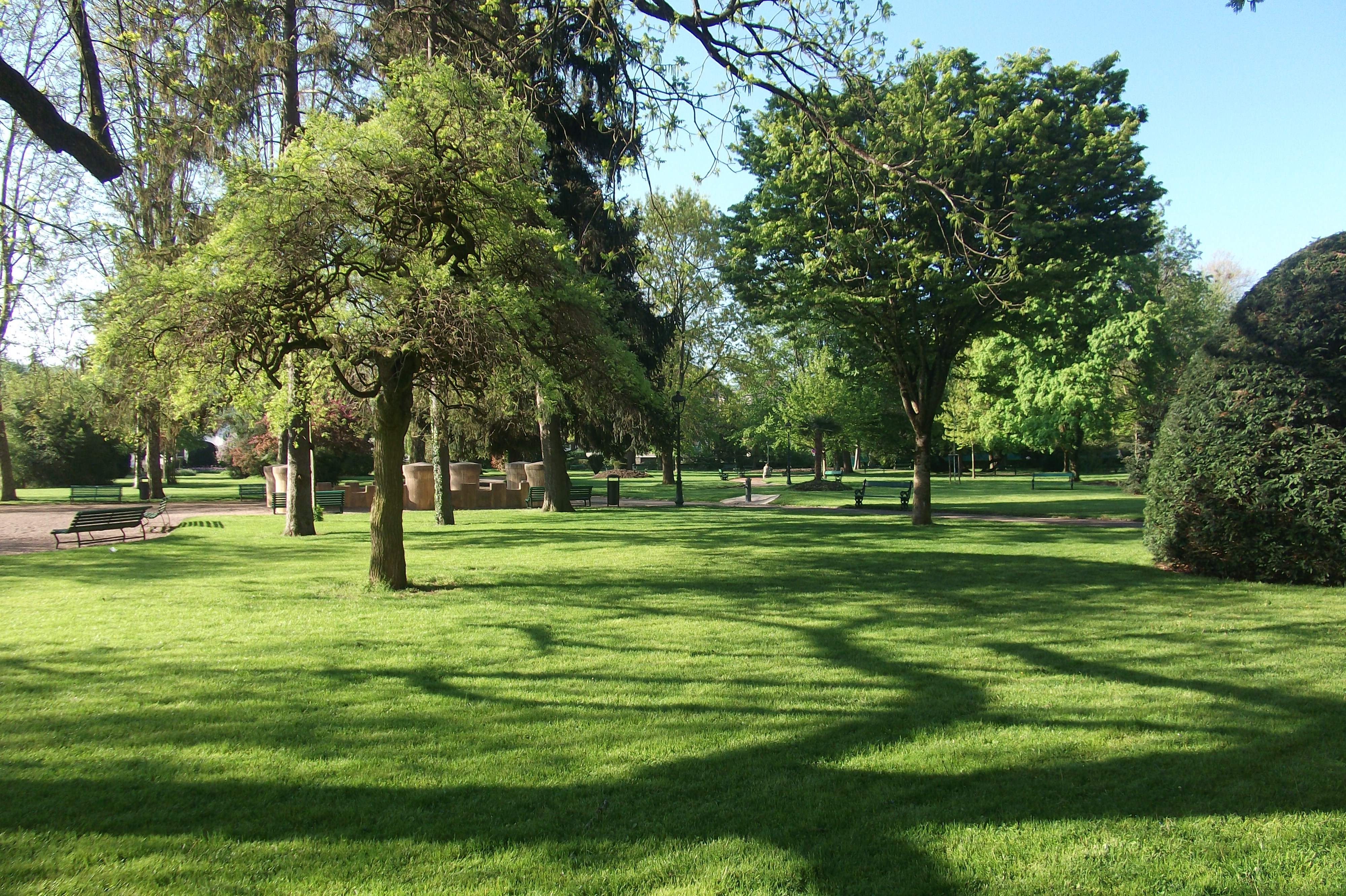 Le jardin anglais de Vesoul (Haute-Saône, Franche-Comté)